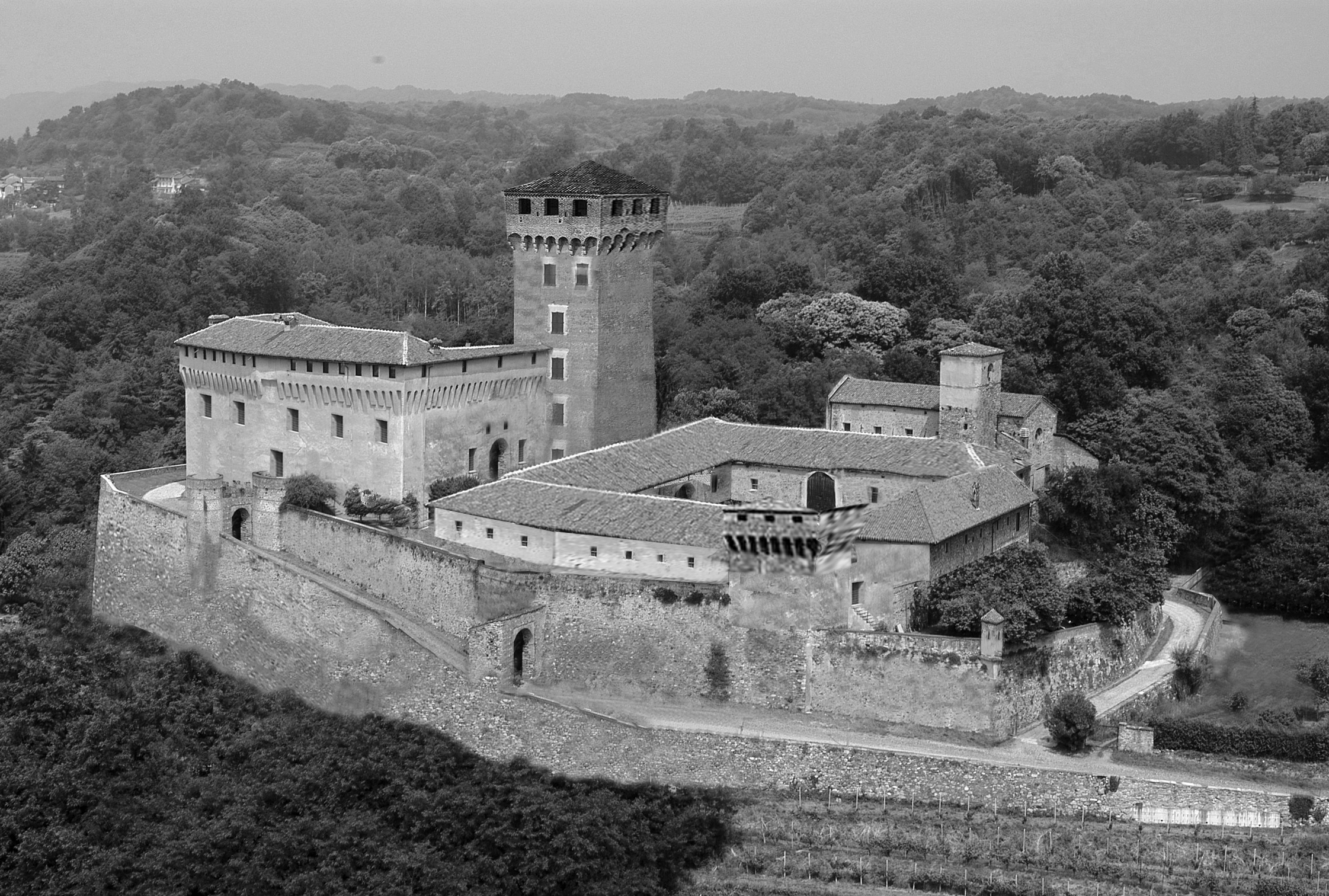 restituzione castello di Roppolo